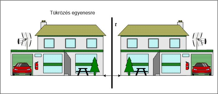 Geometriai transzformáció 2D-ben: tükrözés egyenesre